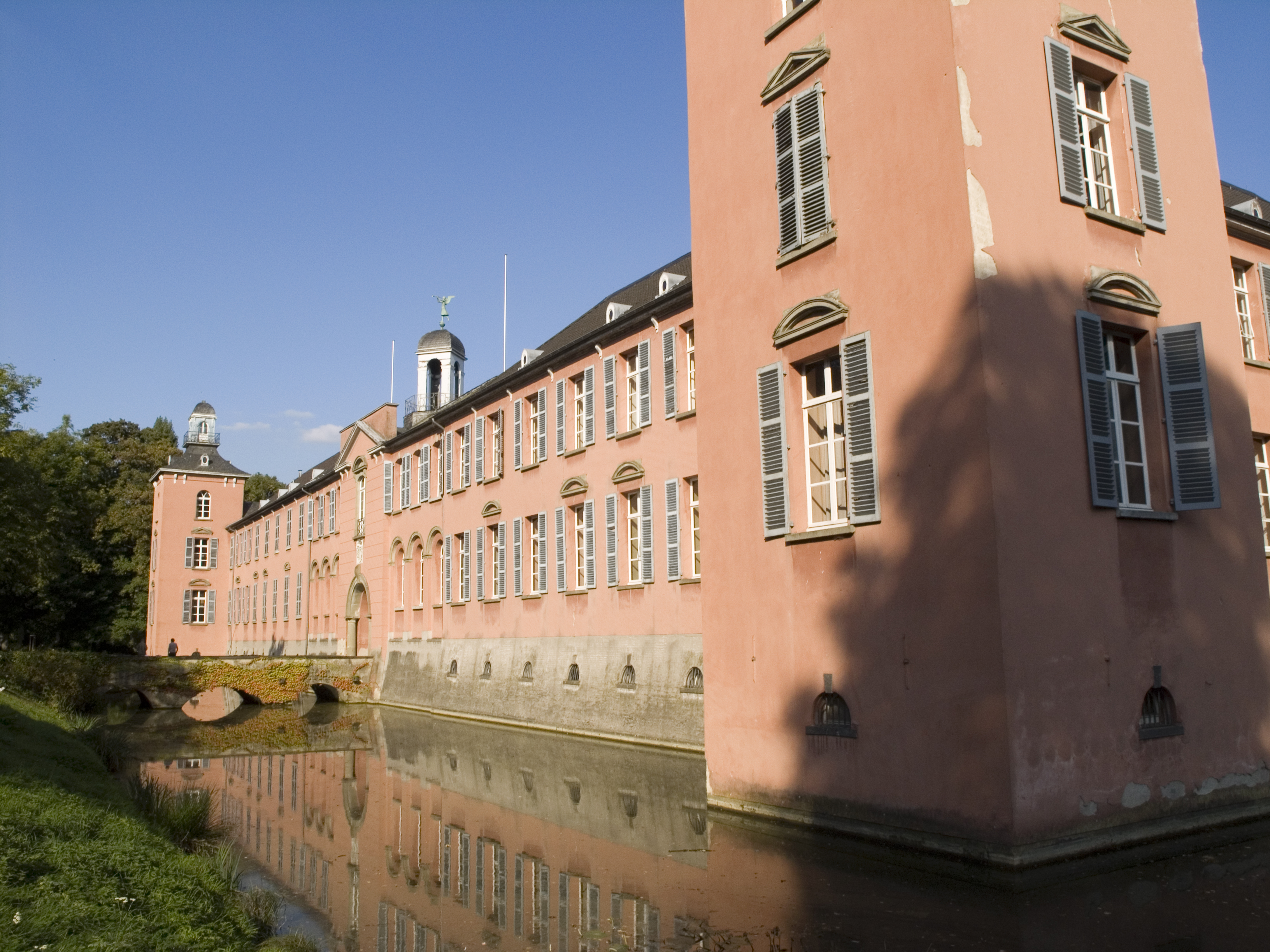 Германия, Северный Рейн-Вестфалия, Дюссельдорф. Замок Калькум (Schloss Kalkum)